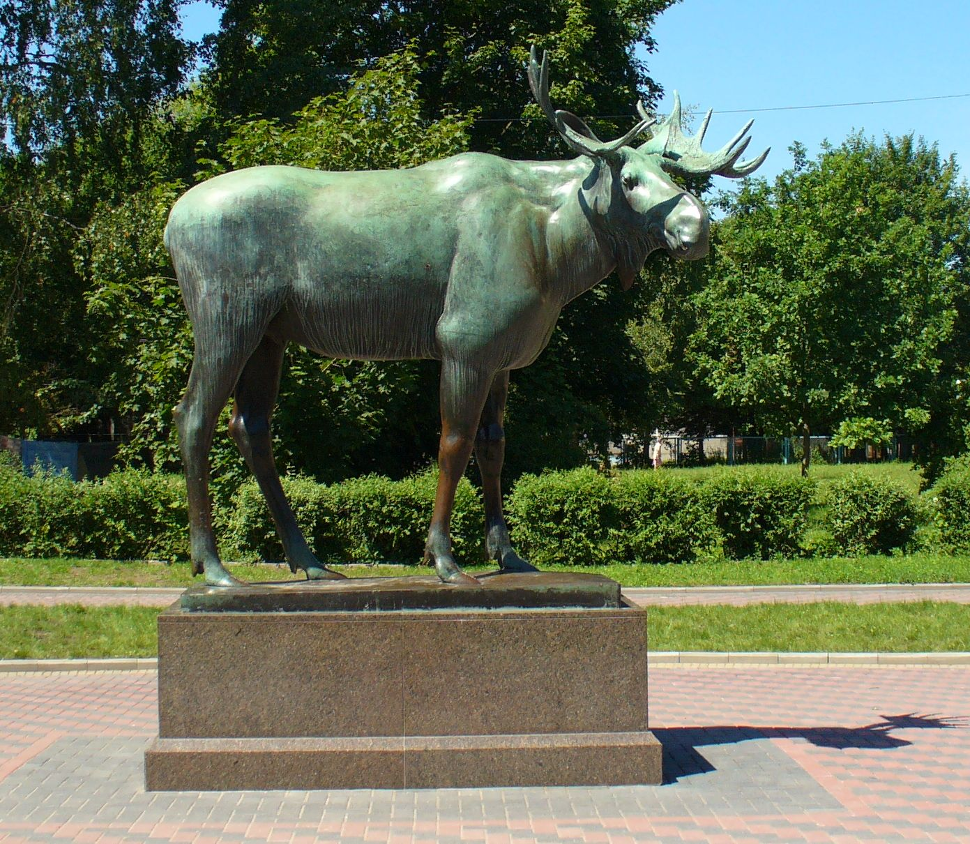 Der Elch von Ludwig Vordermayer in Gusev / Gumbinnen